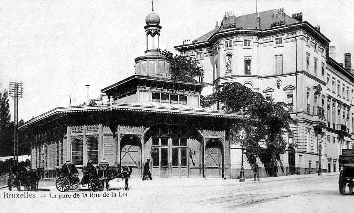 Ancienne gare provisoire de la rue de la Loi à Bruxelles. Elle est l'origine de la la gare de Bruxelles-Schuman.